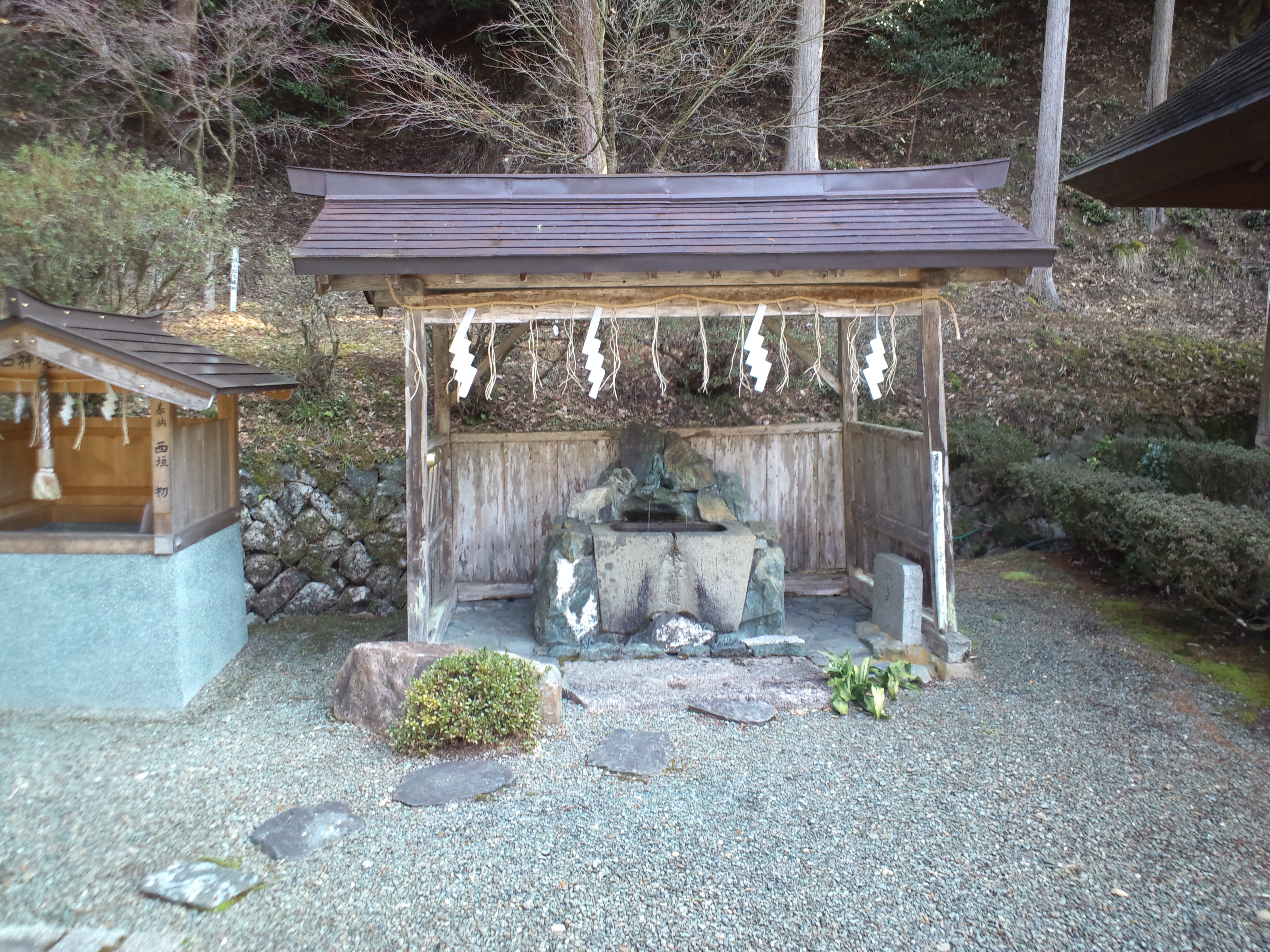 摩氣神社 手水舎